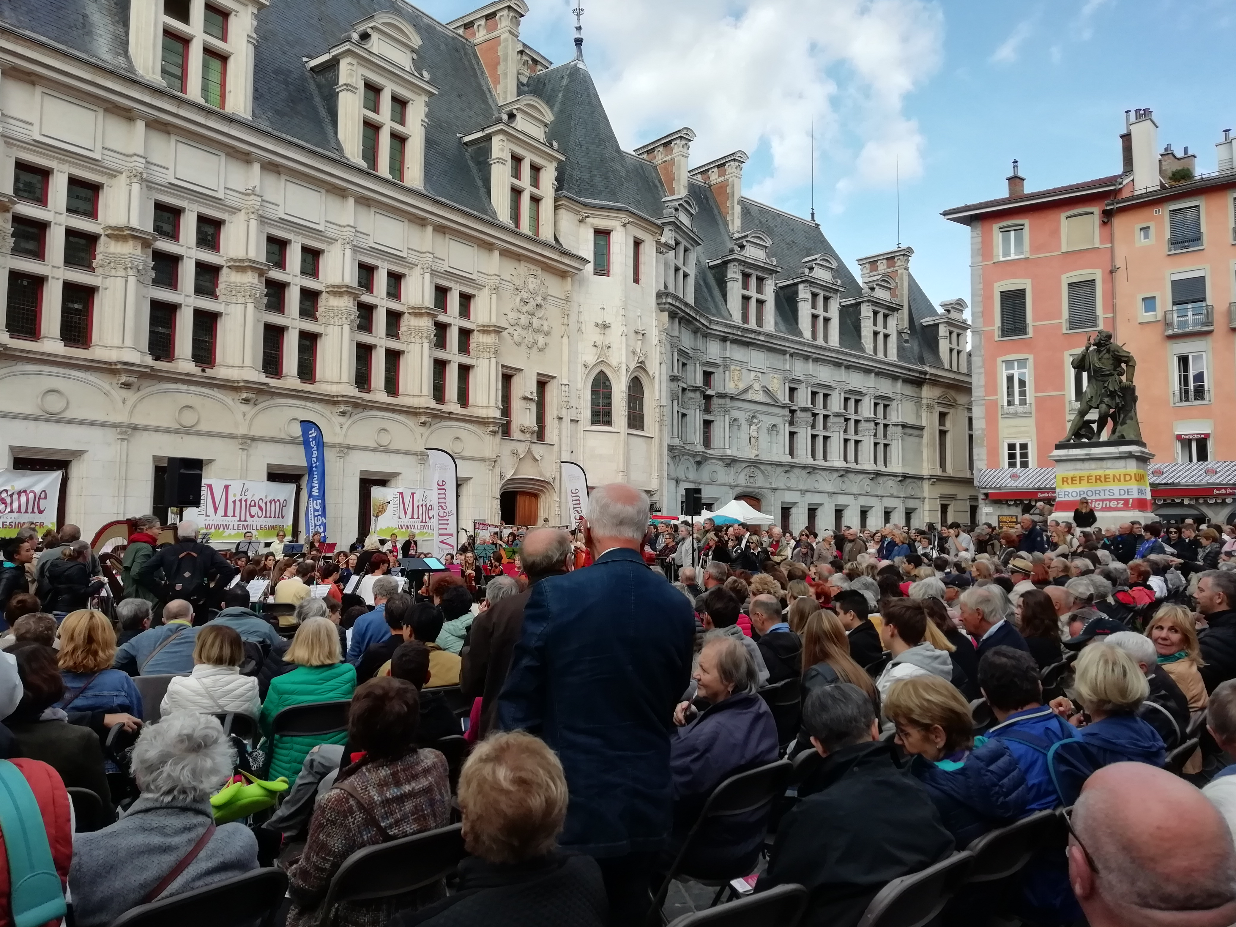 festival œnologique et musical de Grenoble. La statue de Bayard est drapée d'une bannière pour inviter à signer pour le référendum d'initiative partagée sur les aéroports de Paris.